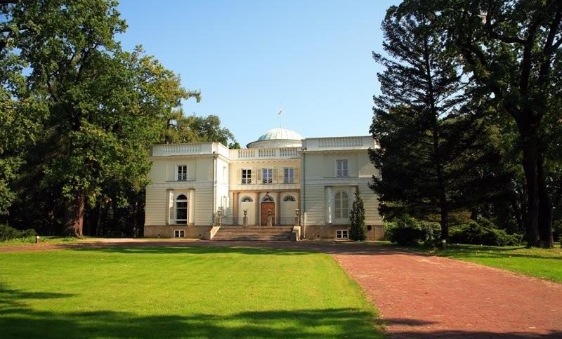 Warszawa (Polska)